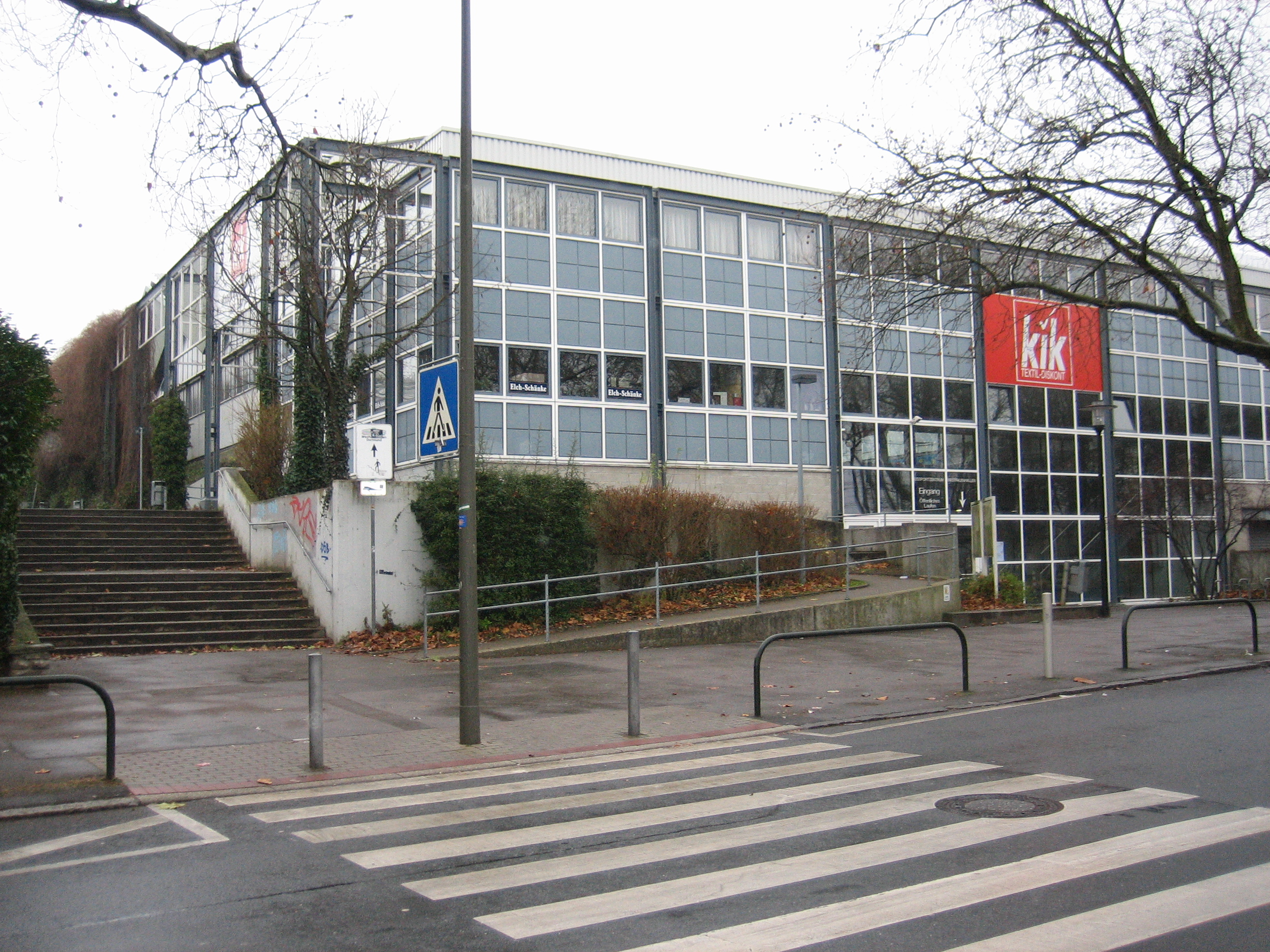 Fassade des Eissportzentrums Westfalenhallen